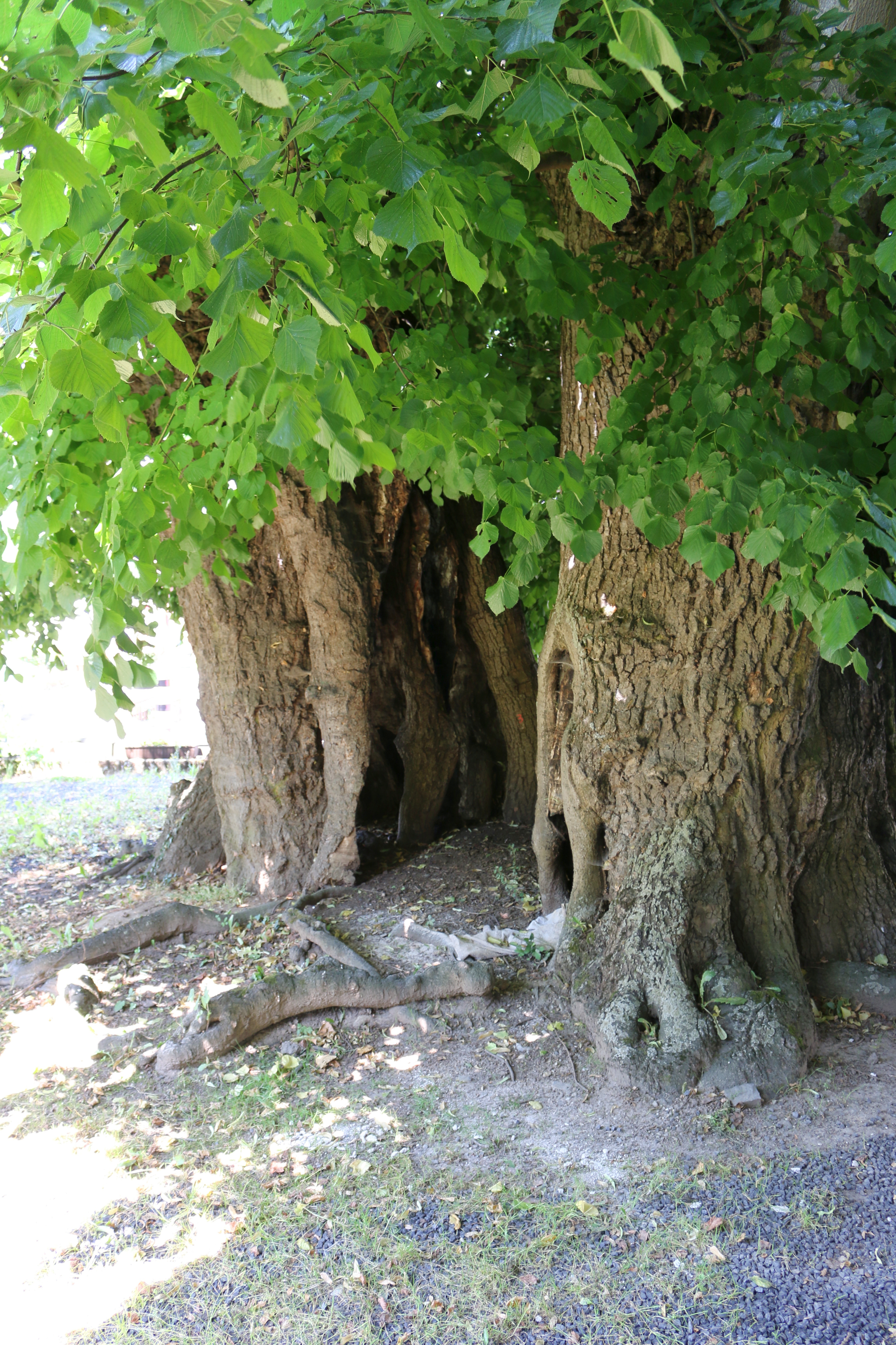 Langendernbach, Westerwald: Somerlinde vor der Kirche, Naturdenkmal